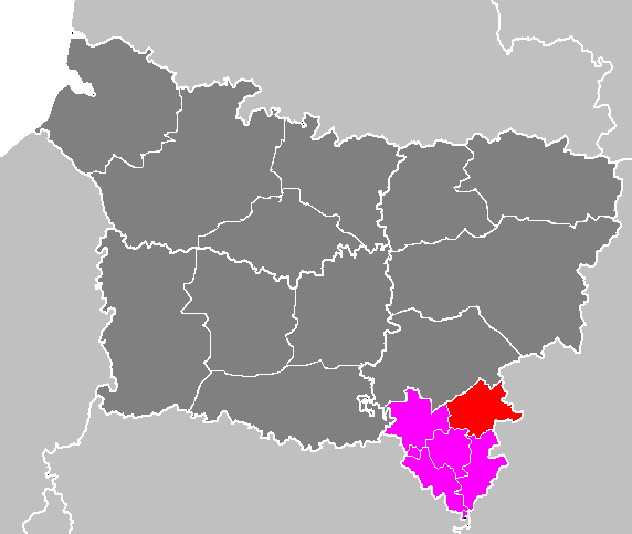 Carte du canton de Fère en Tardenois